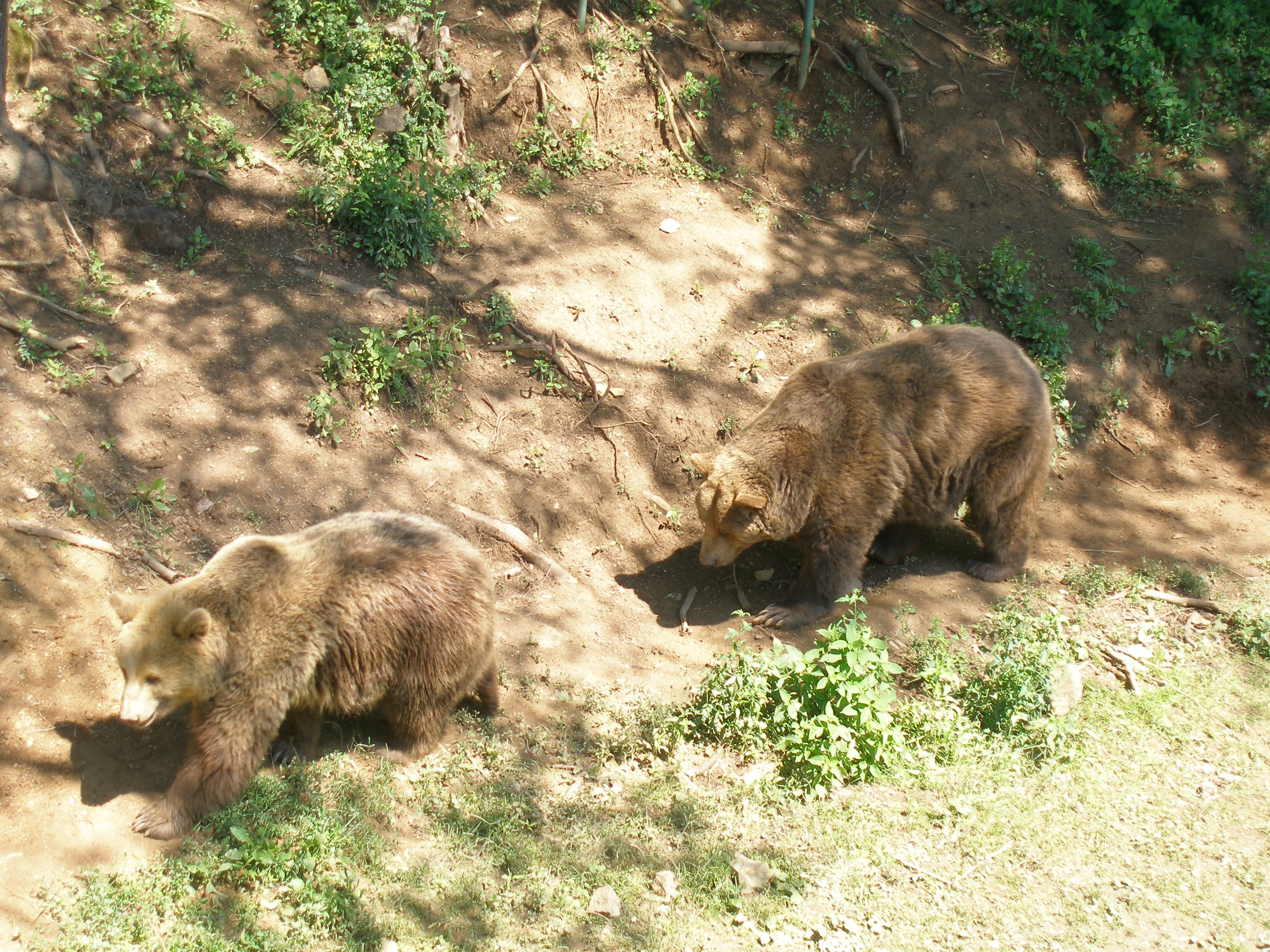 Zoologická záhrada v Košiciach miestna časť Kavečany.